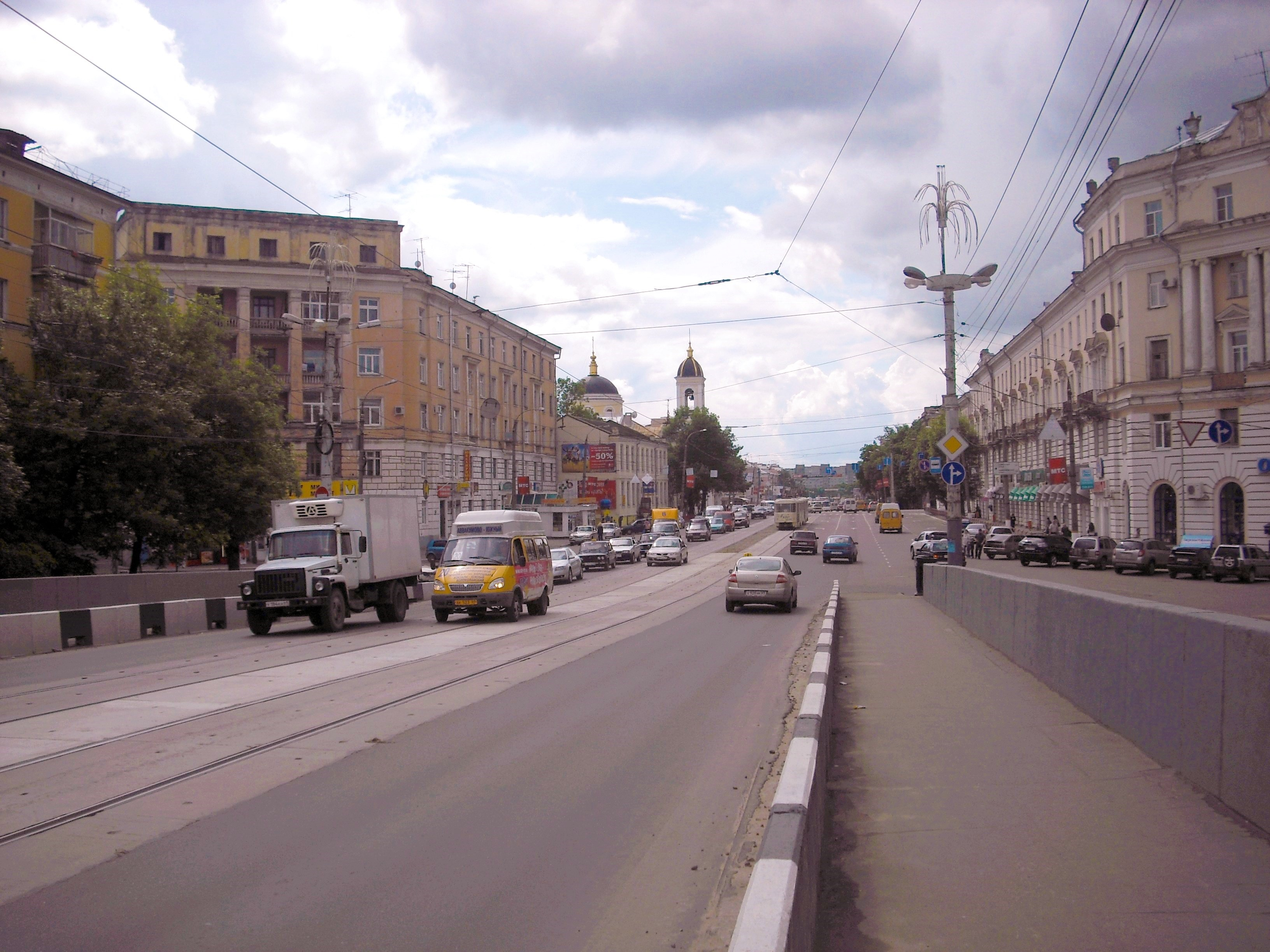 Тверской проспект в Твери